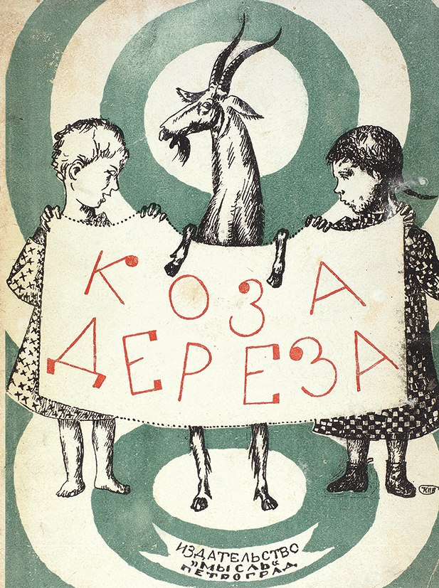 Обложка книги: Коза Дереза (рис. К. Петрова-Водкина). — Пг.: Мысль, 1924. — 8 с.: ил. 26×19,5 см.